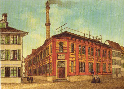 Winterthurer Bad- und Waschanstalt an der Badgasse, Aquarell von Jakob Ziegler-Sulzberger (1801–1875), gemalt 1868